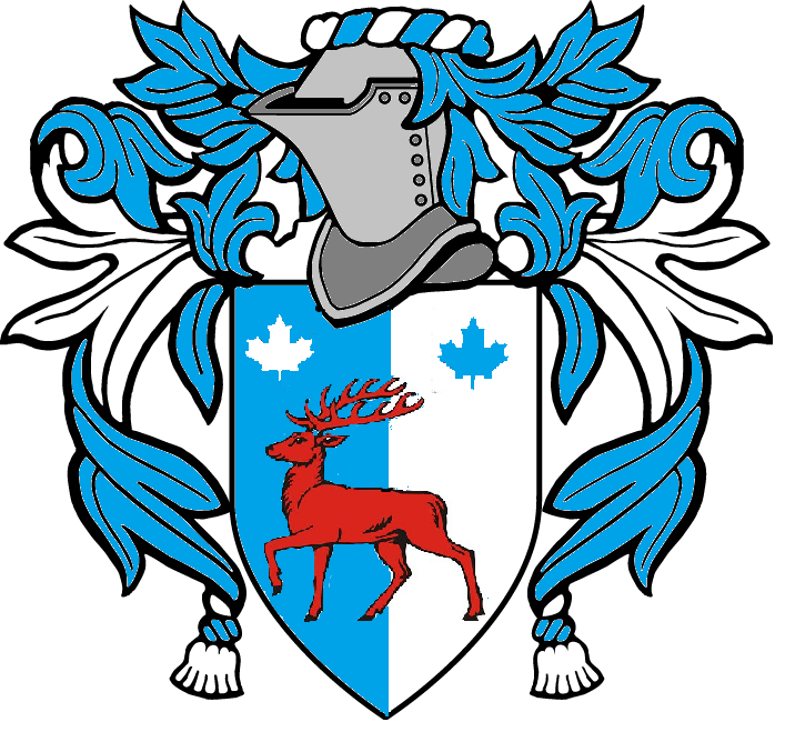 Stemma della famiglia Penzo Torelli